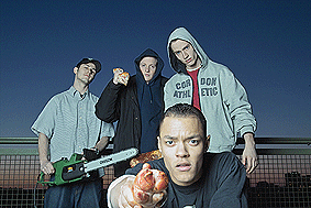 Gruppenbild der Rap-Crew K.I.Z.